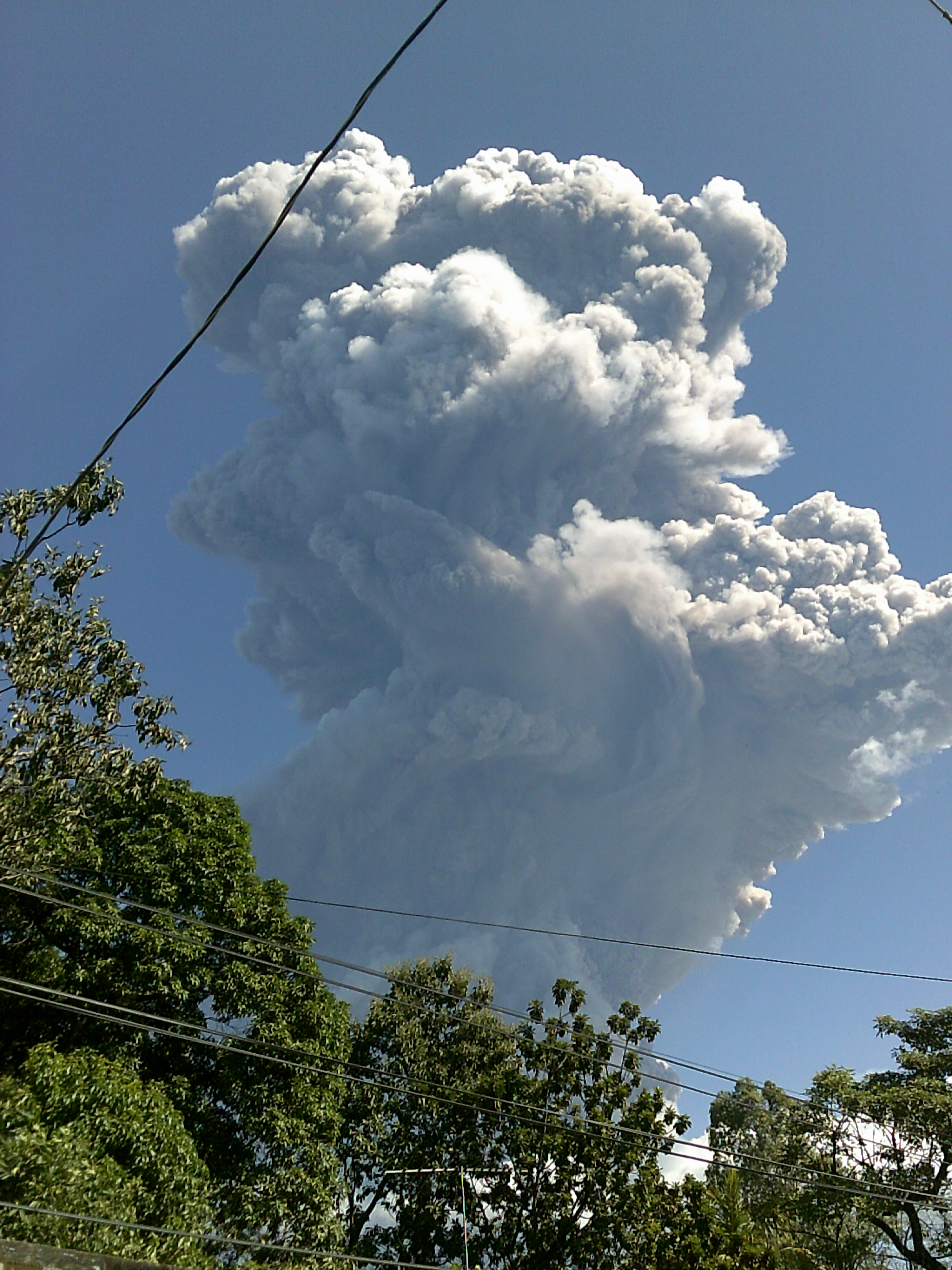 Fumarola 4 ó 5 minutos después de iniciado la erupción del 29 de diciembre de 2013. Desde San Rafael Oriente, San Miguel.